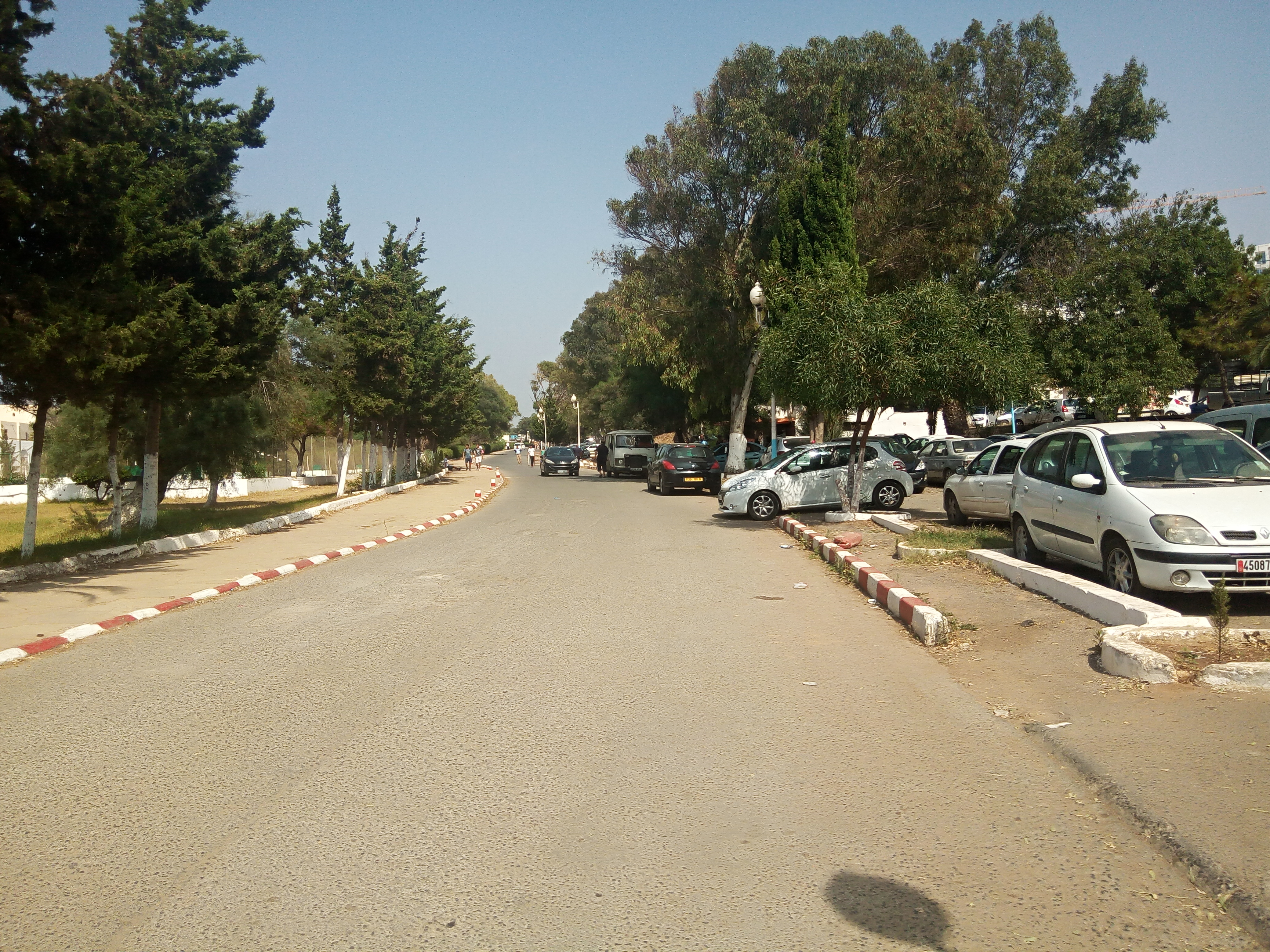 Complexe Touristique de Matarès la sortie